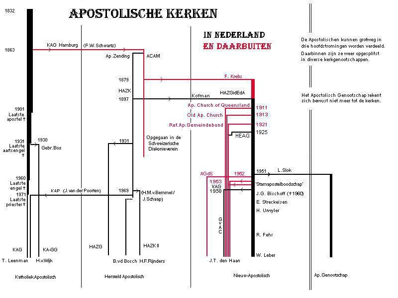 Zelf gemaakt, overzicht van Apostolischen in Nederland en daarbuiten